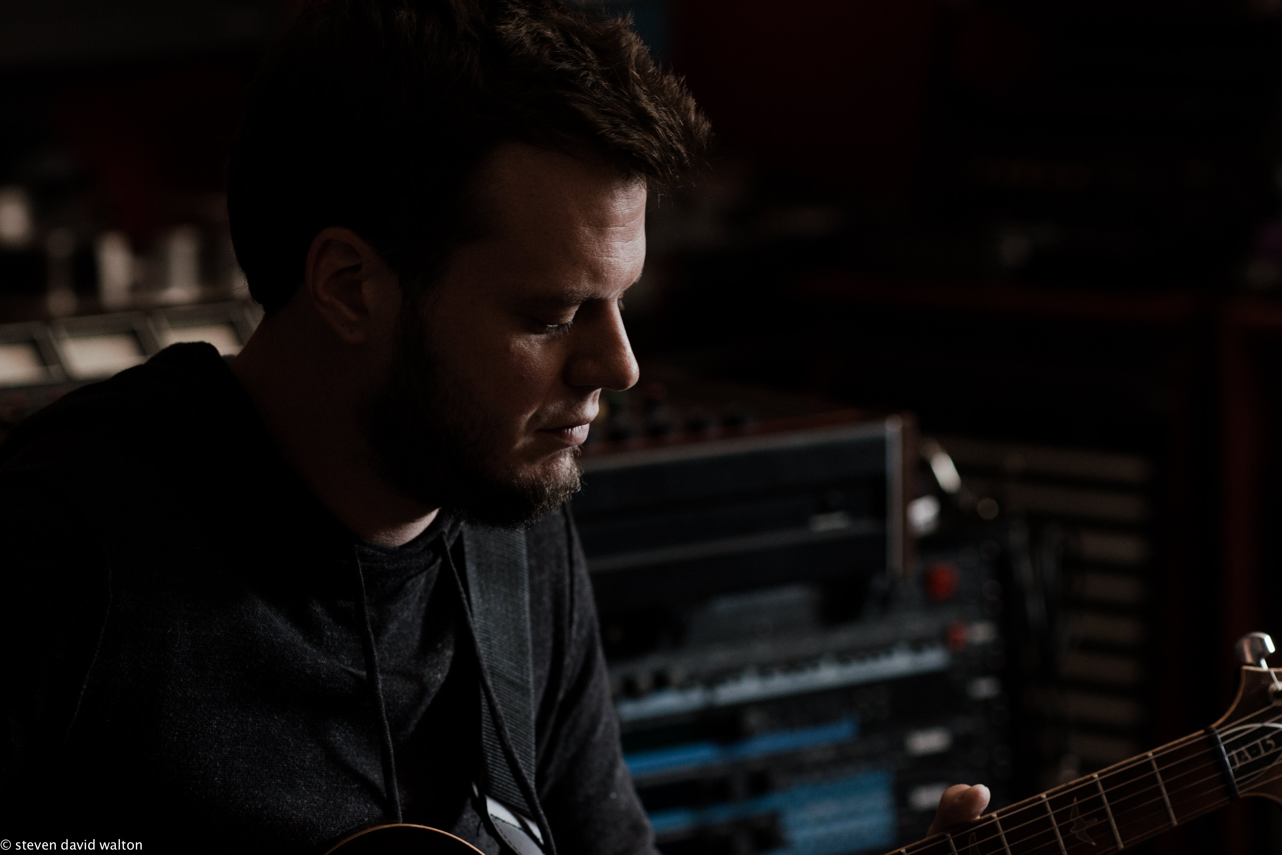 Emil Werstler